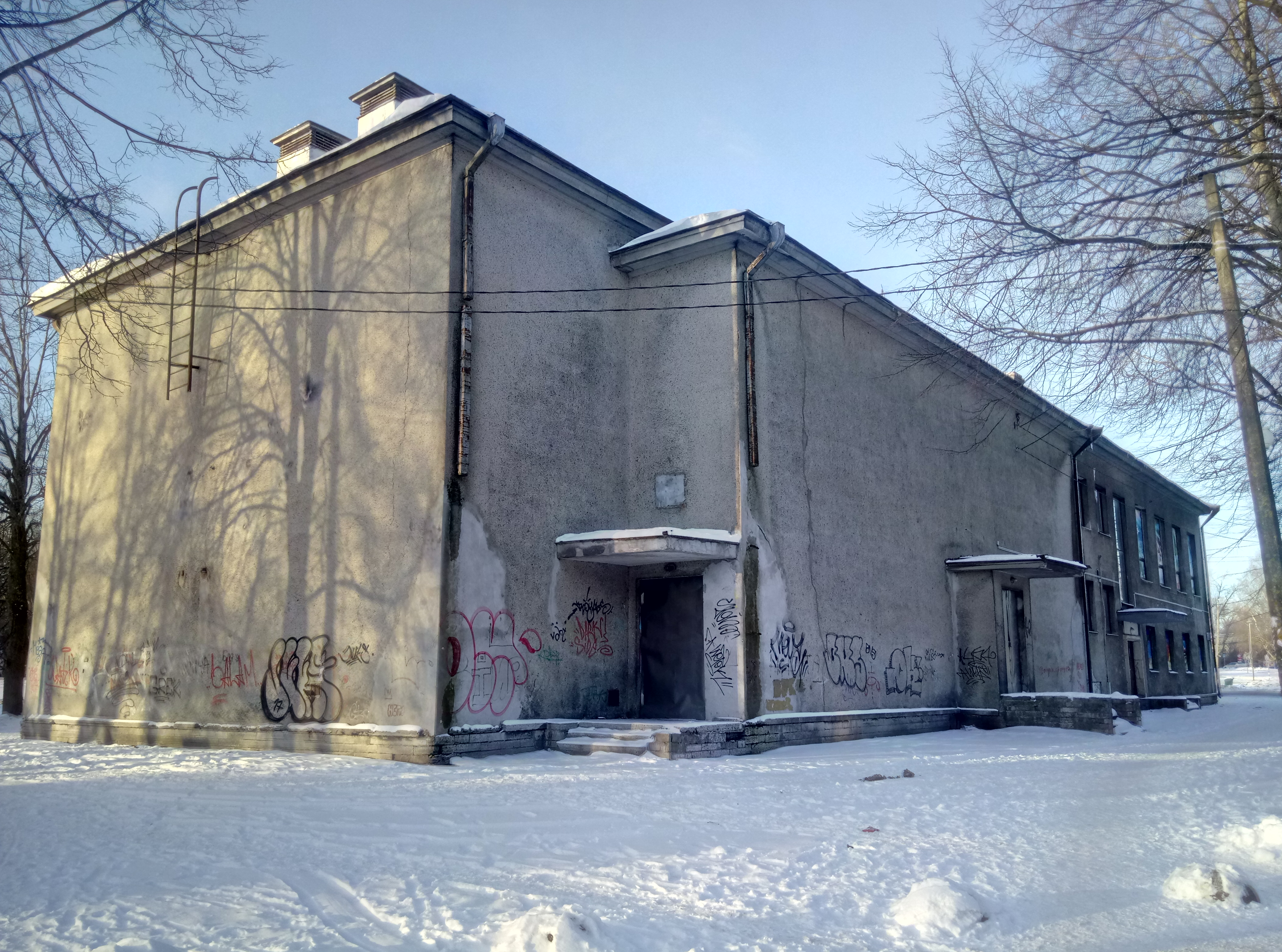 Vaade kinole kagust.Foto: Robert Treufeldt, 16. jaanuar 2019